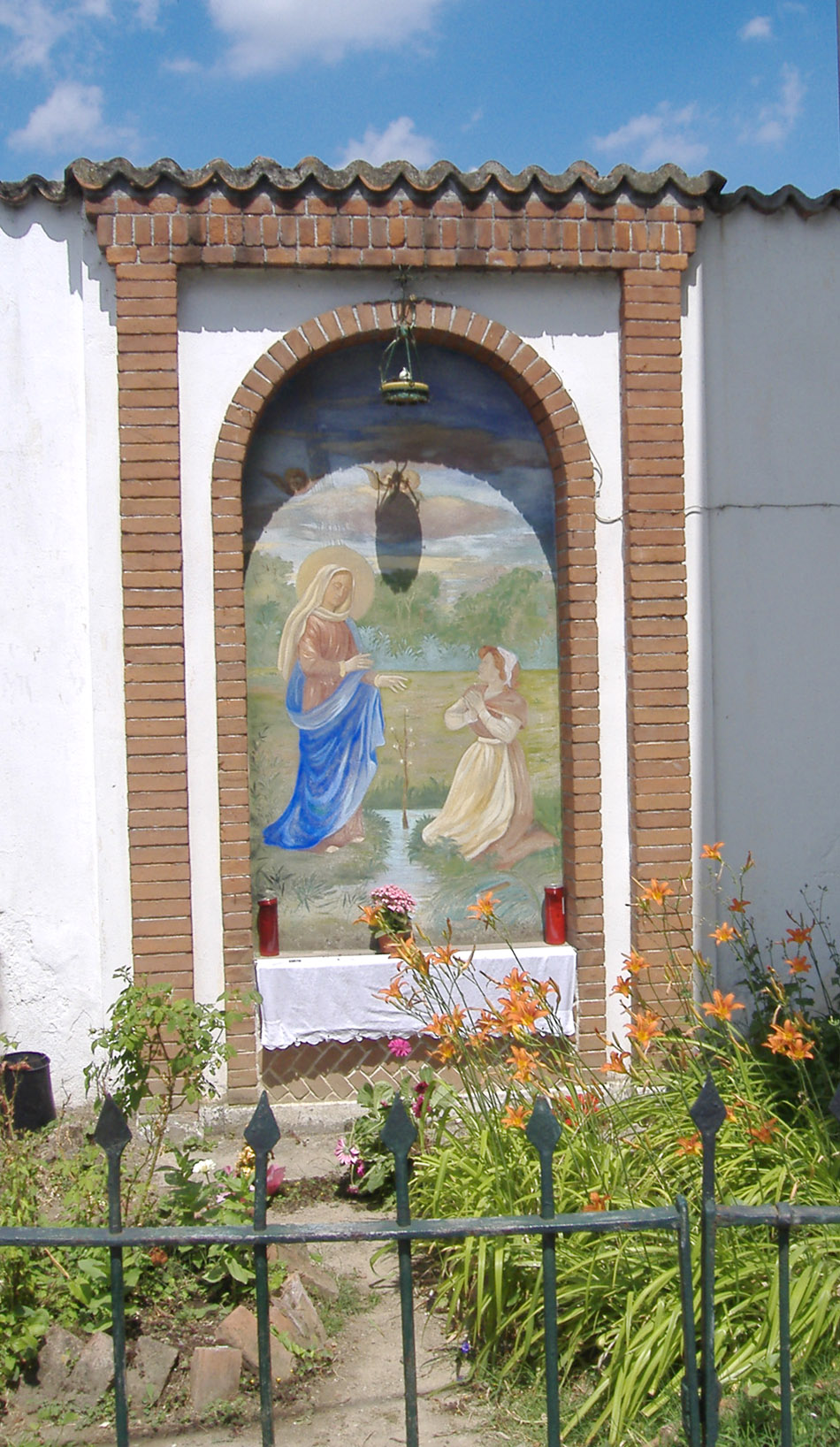 La Madonnina al Canale Bertonica a Cervignano d’Adda, (LO) Italia